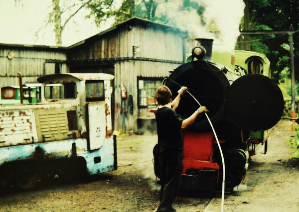 W Muzeum Kolei w Mladejovie na Morawach.